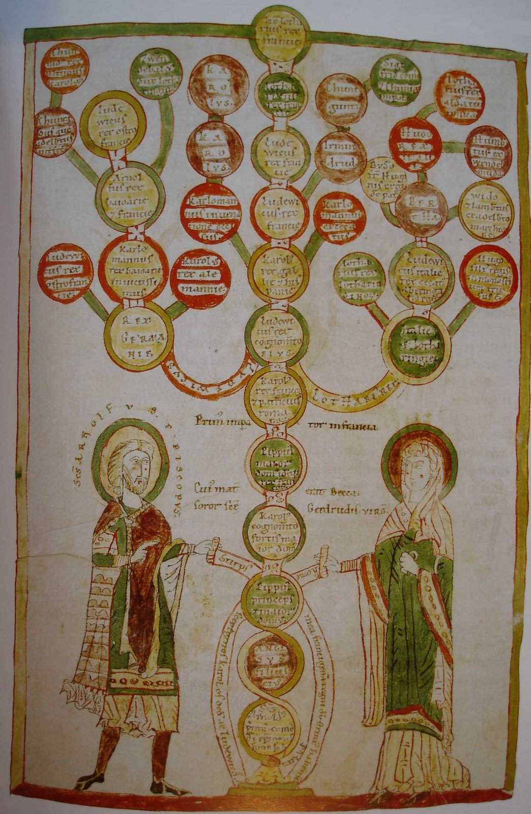 Généalogie carolingienne